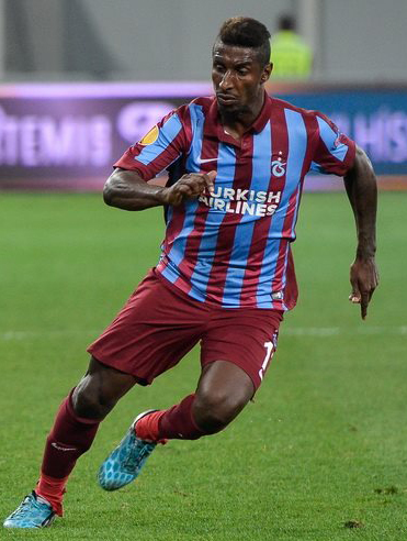 Kévin Constant, Trabzonspor formasıyla Metalist karşısında.